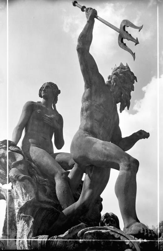 Potsdam.- Neptungruppe am Stadtschloß